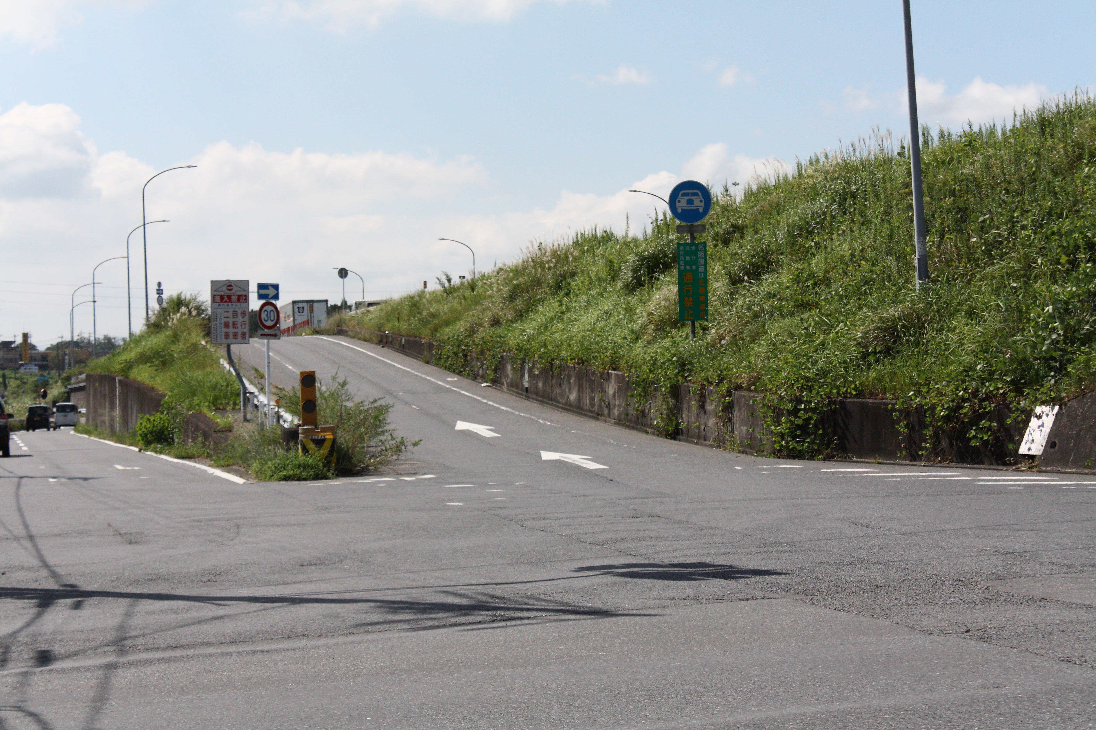 名阪国道 中瀬インターチェンジ（ダイヤモンド型） 天理方面入口 三重県伊賀市荒木